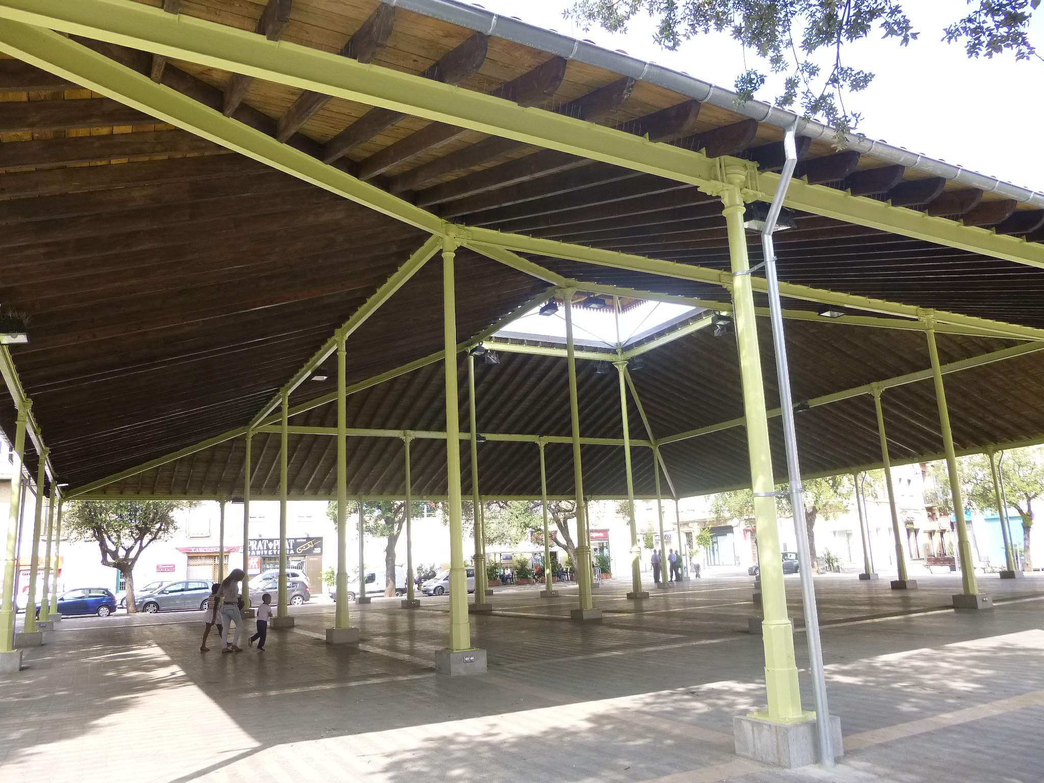 Plaza del Gra (Figueres)